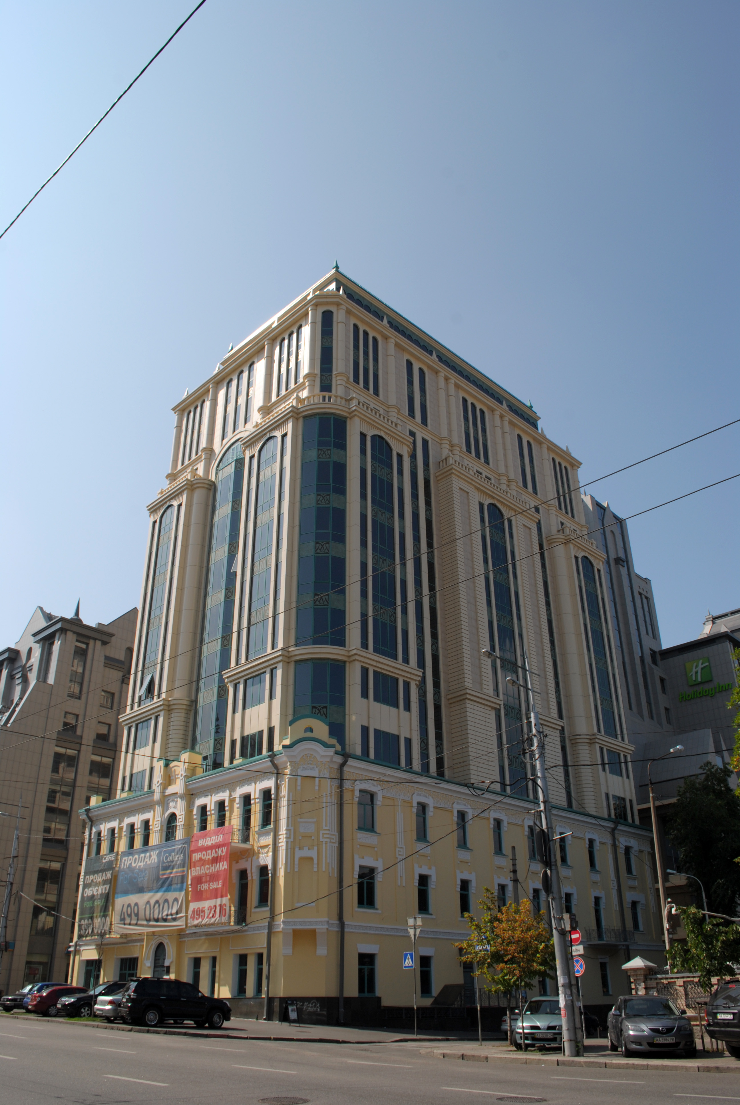 Будинок прибутковий, Київ, Червоноармійська вул., 98